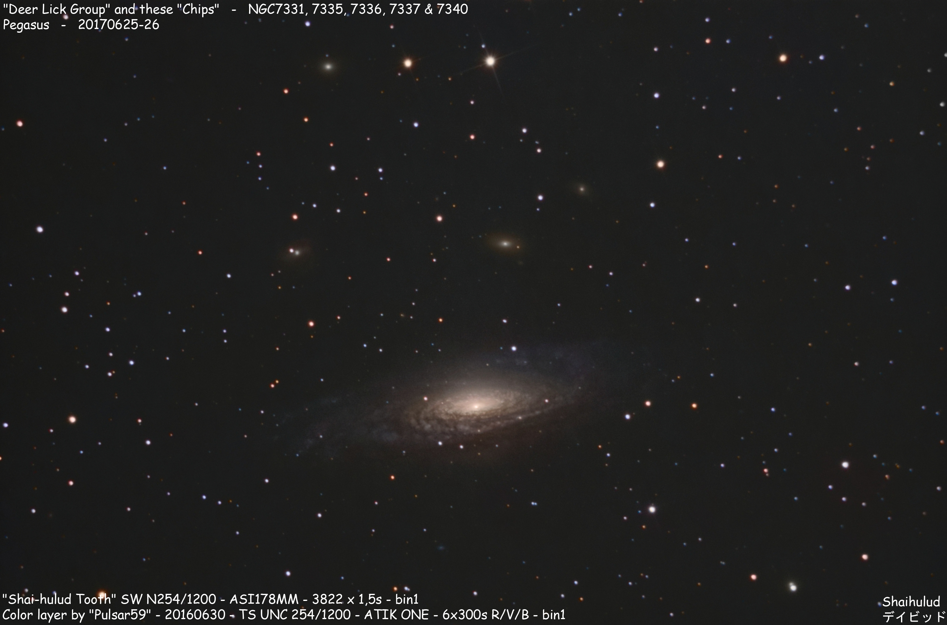 "Deer Lick Group" NGC7331